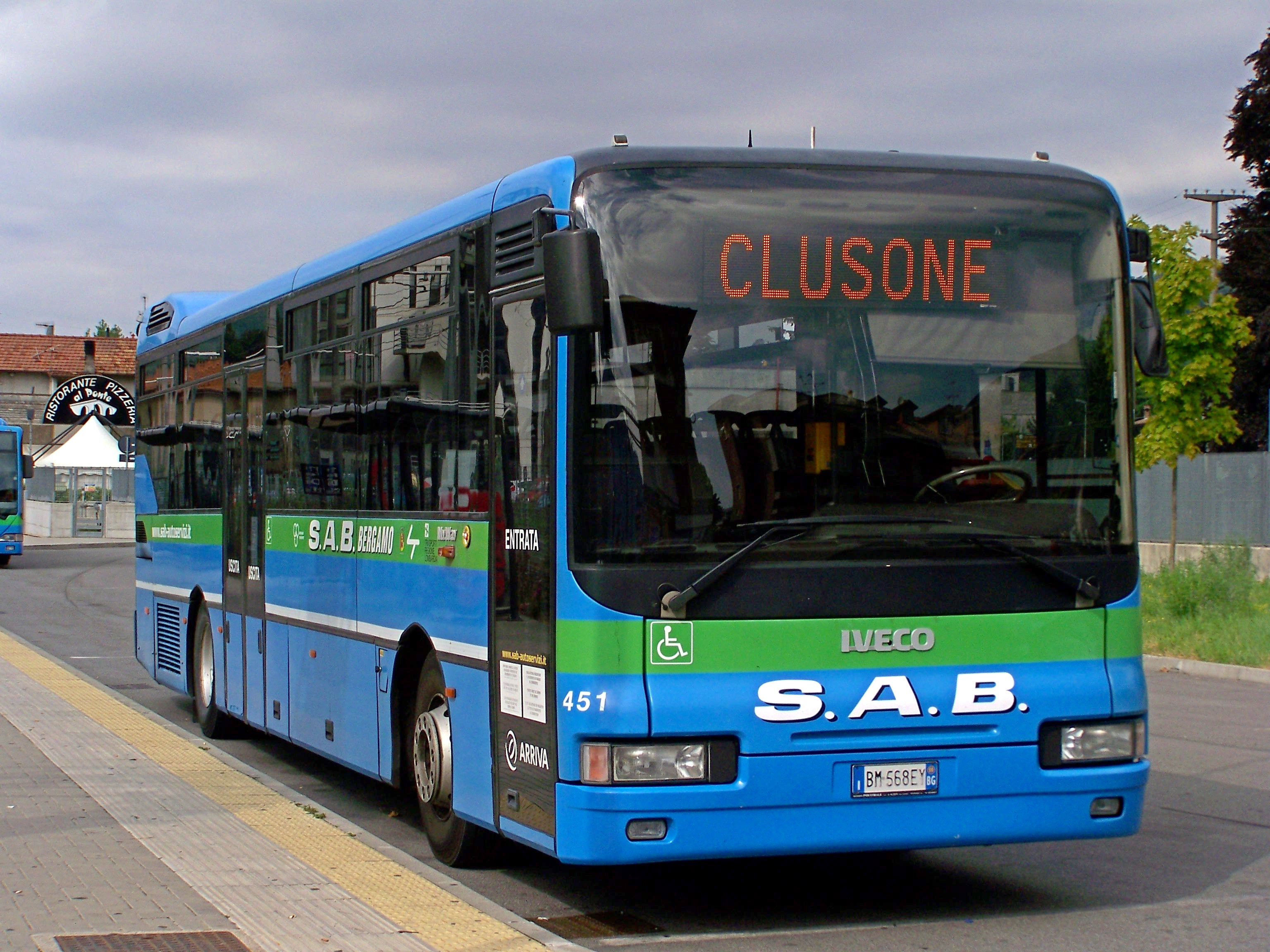 L'Iveco MyWay SAB 451 in sosta presso l'autostazione di Albino, antistante la stazione tranviaria